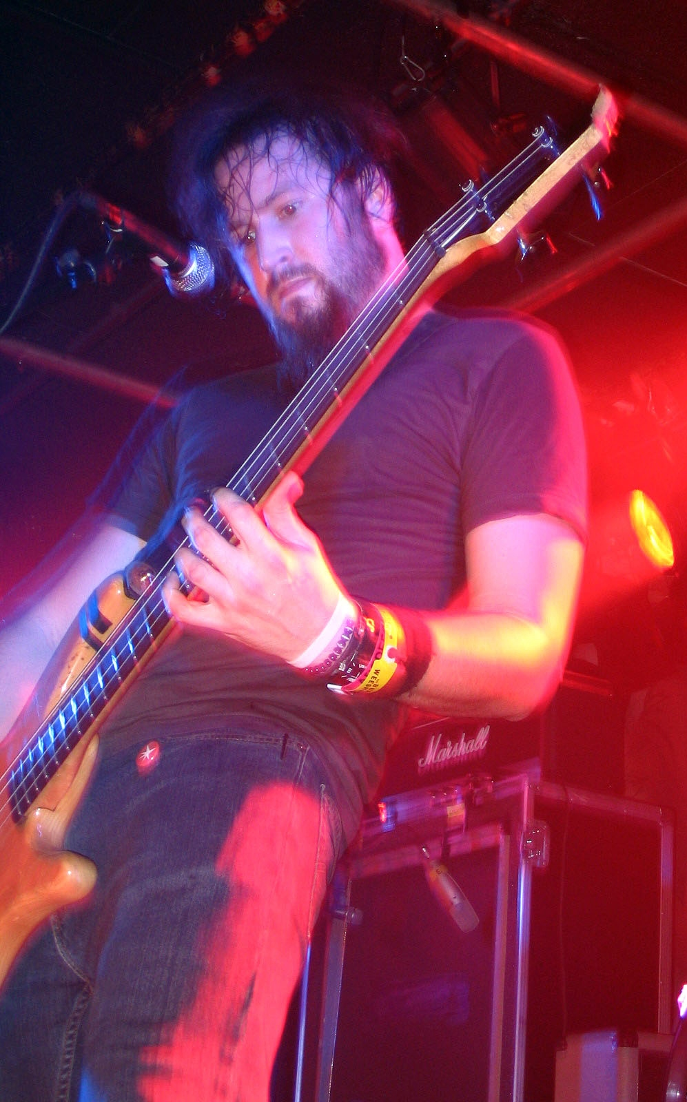 Troy Sanders live in Burgerweeshuis (Niederlande)